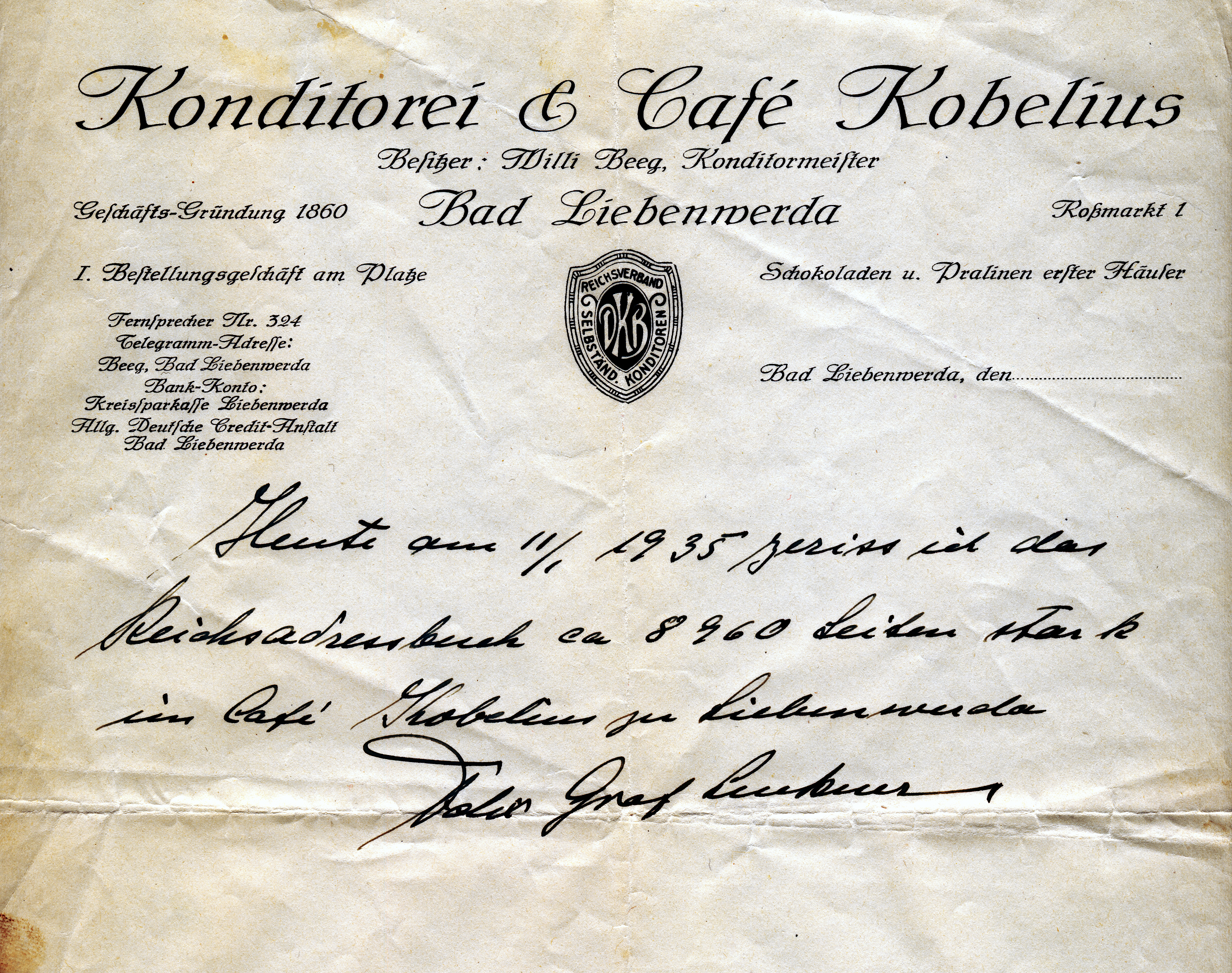 Felix Graf von Luckner bestätigt, das er am 11. Januar 1935 ein Reichsadressbuch mit ca. 8960 Seiten im Cafe Kobelius in Bad Liebenwerda zerrissen hat. Das ehemalige Cafe Kobelius heißt heute Bärchencafe.